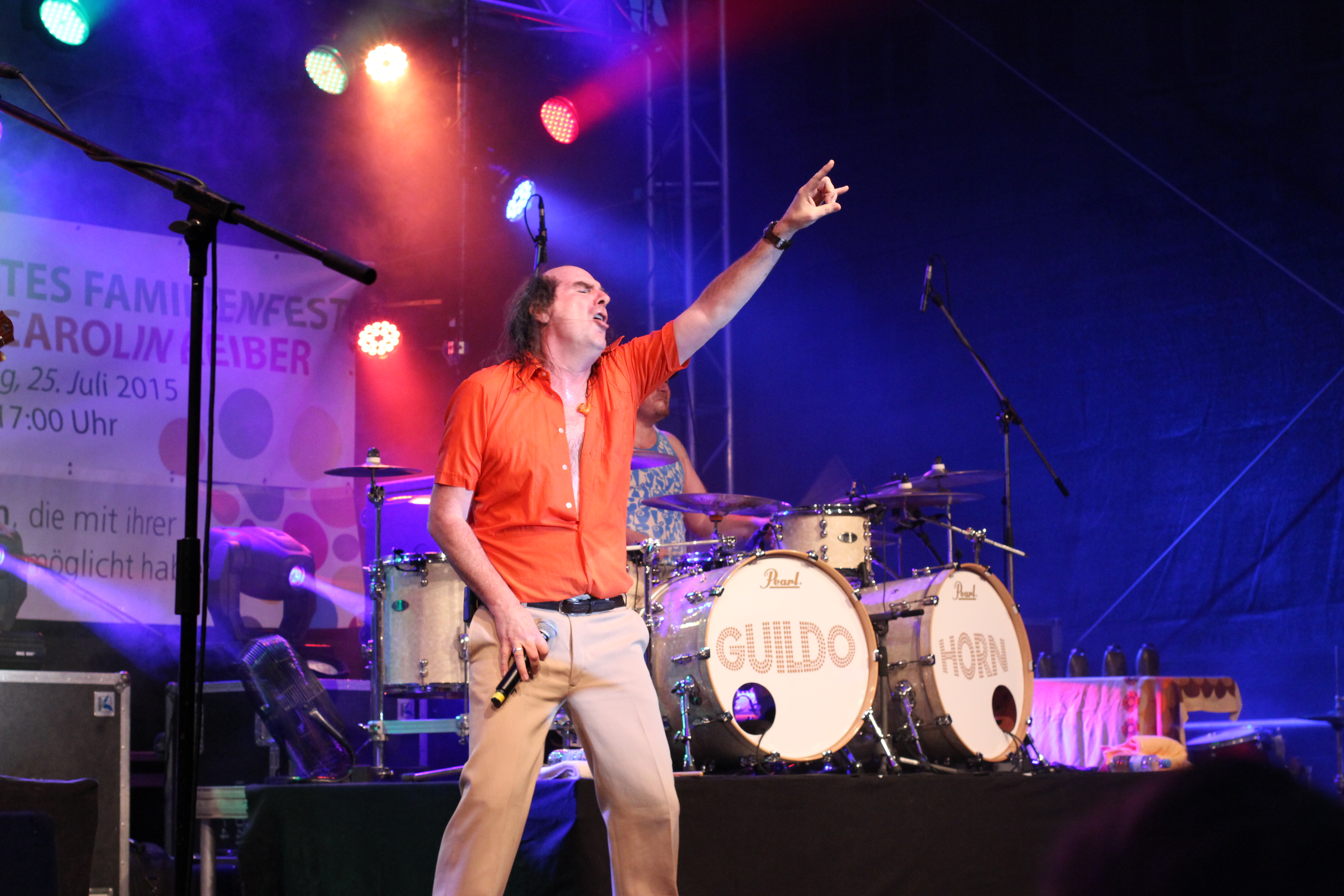 Guildo Horn mit den Orthopädischen Strümpfen: Auftritt am 24. Juli 2015 auf dem St.-Mang-Platz in Kempten zum 50-jährigen Jubiläum der Lebenshilfe Kempten